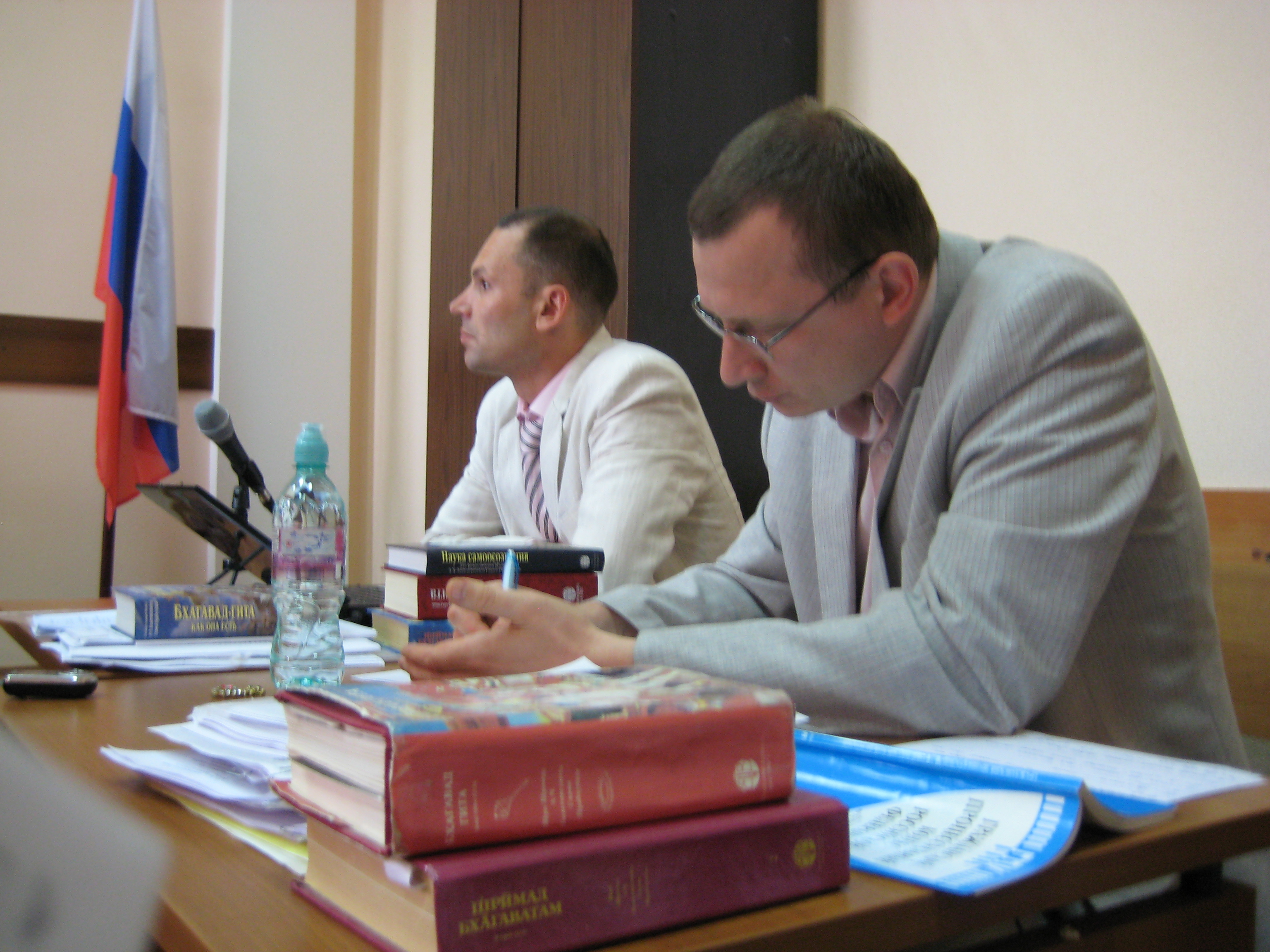 Представители защиты Александр Шахов и Михаил Фролов на втором судебном заседании по делу о признании книги "Бхагавад-гита как она есть" экстремистским материалом.